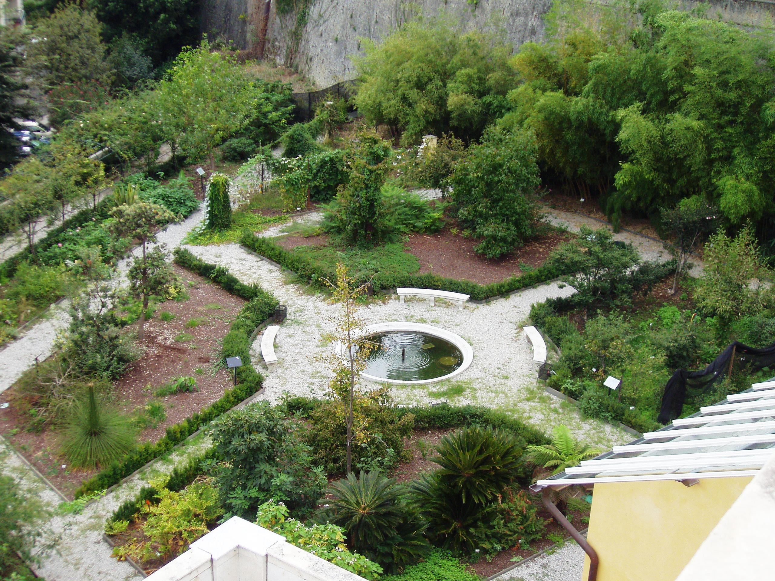 Giardino Botanico Clelia Durazzo Grimaldi - gardens. Pegli (Genoa), Italy.